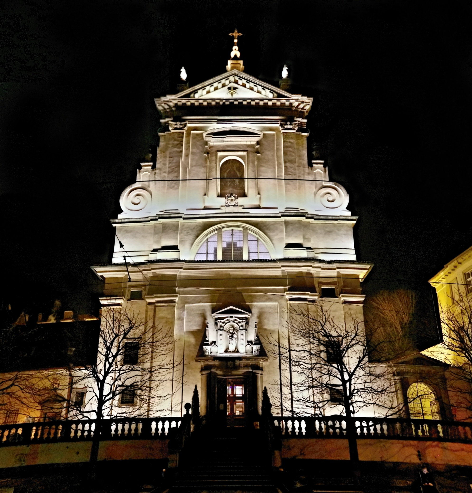 Kostel Panny Marie Vítězné a sv. Antonína Paduánského na Malé Straně v Praze